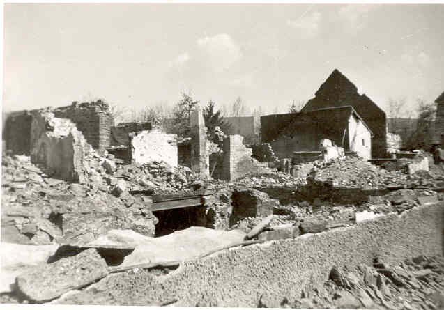 Berghausen nach Bombardierung im zweiten Weltkrieg